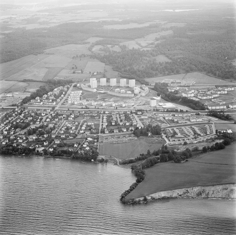 Österängen Motiv: Österängen Nyckelord: Flygbilder Kategori: BostadsområdeÖsterängen.